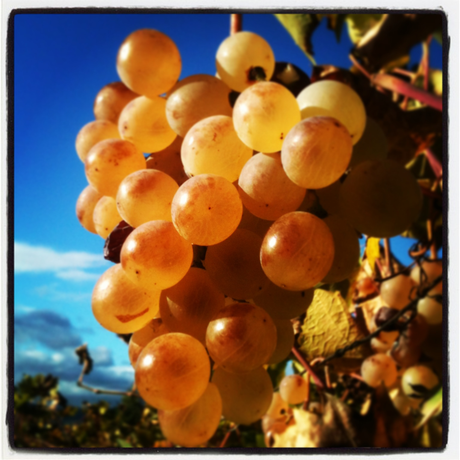 Grappe de muscat d'Alexandrie